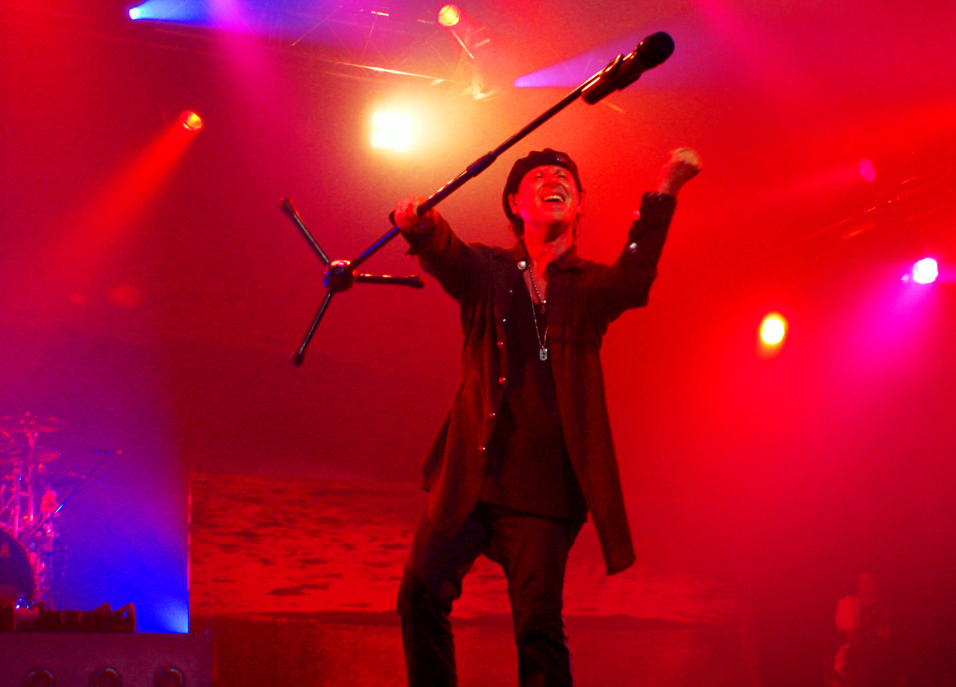 Klaus Meine au Zénith de Nantes en 2007